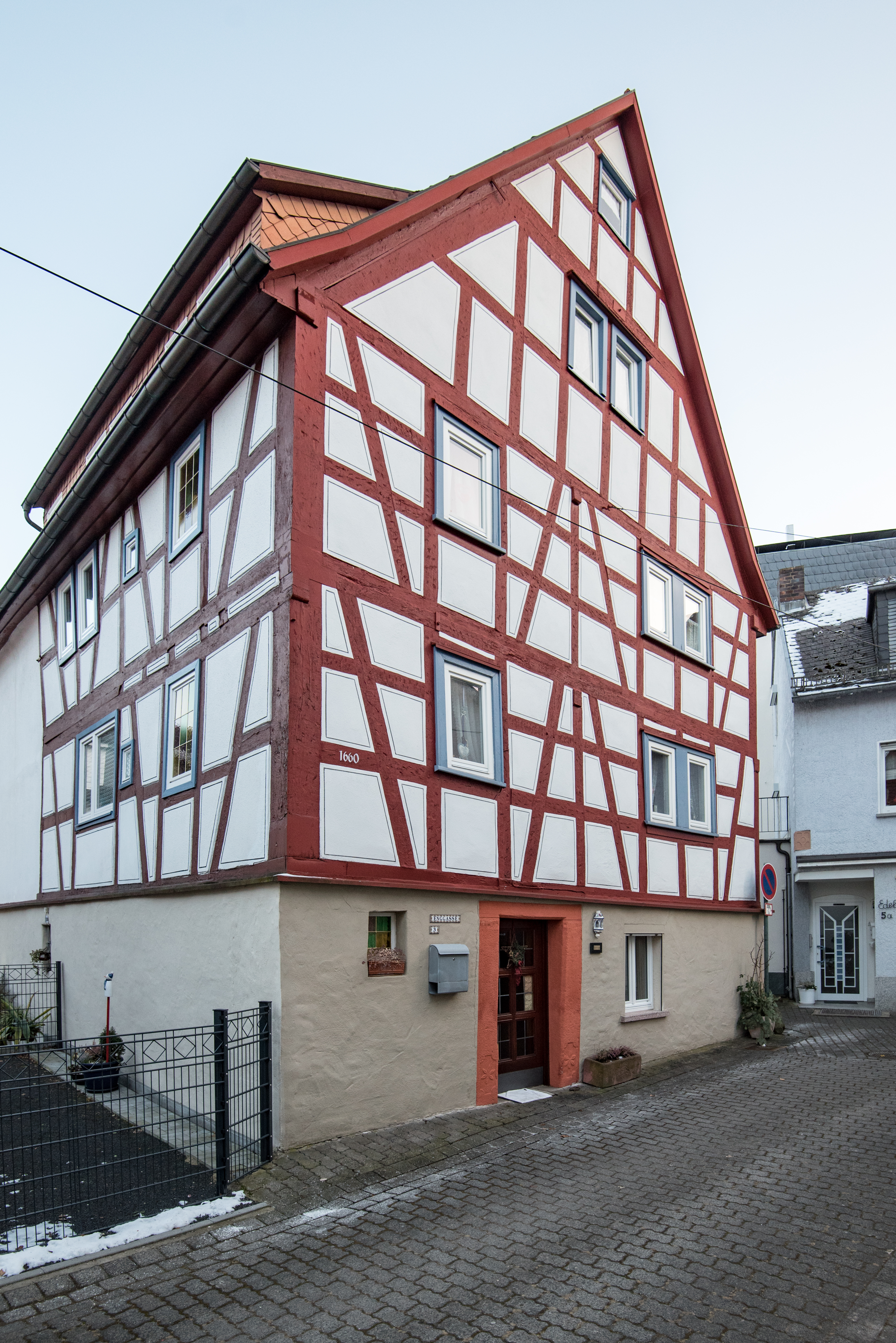 Bad Orb, Enggasse 3